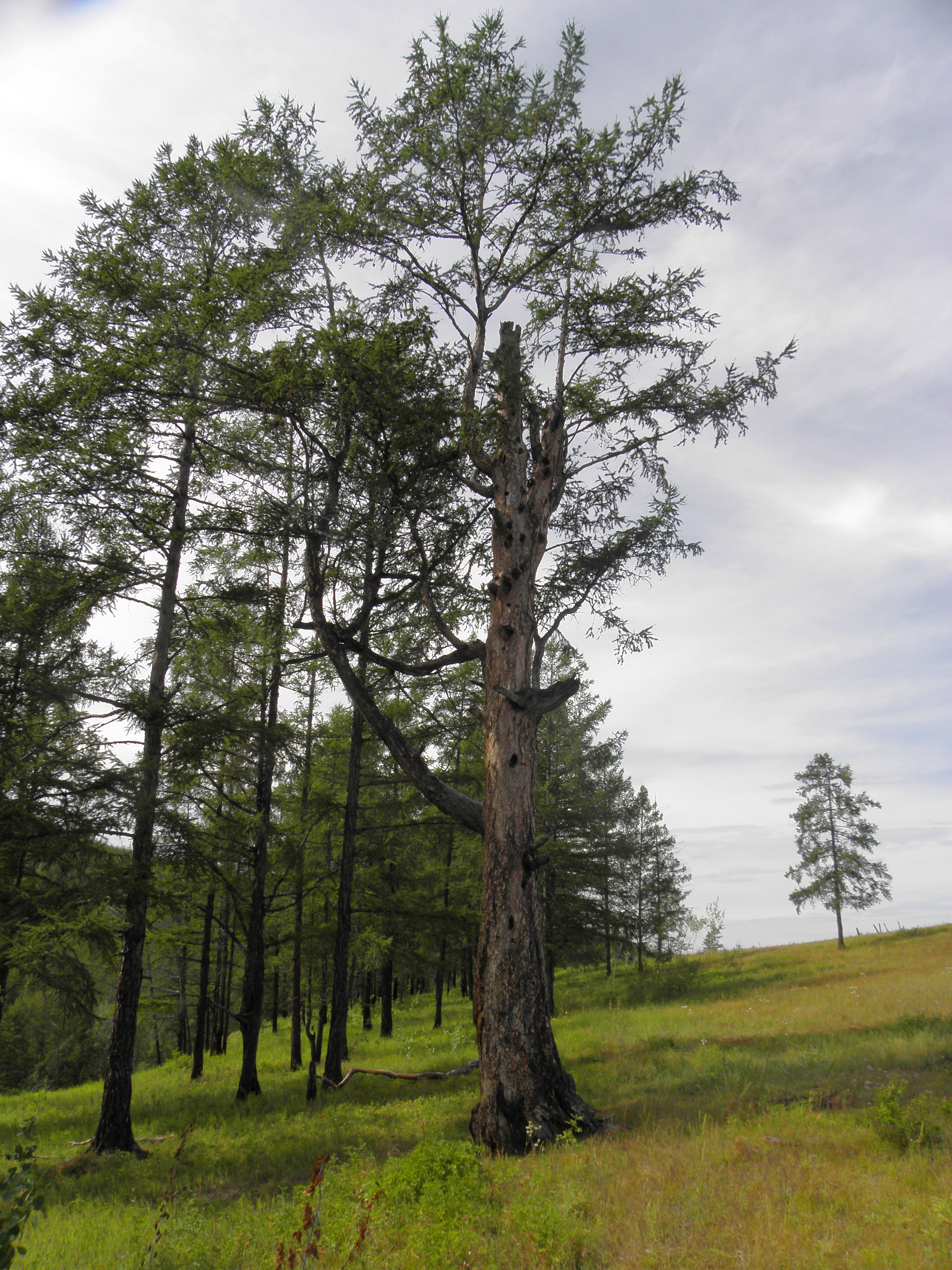 Лиственницы Larix gmelinii в тайге в районе Старой Табаги